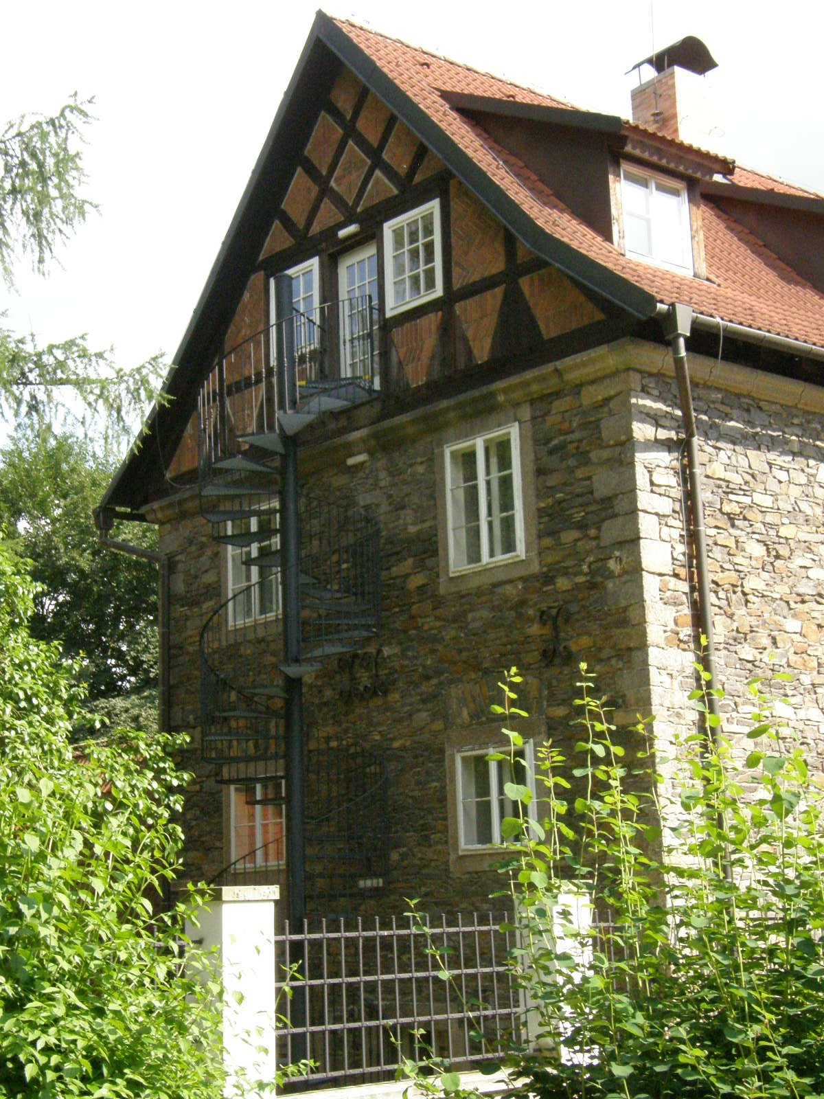 Hrádek v parku Heulos v jihlavě, architekt Fritz G. Winter.